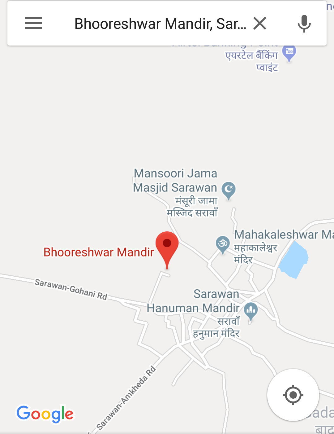 मानचित्र